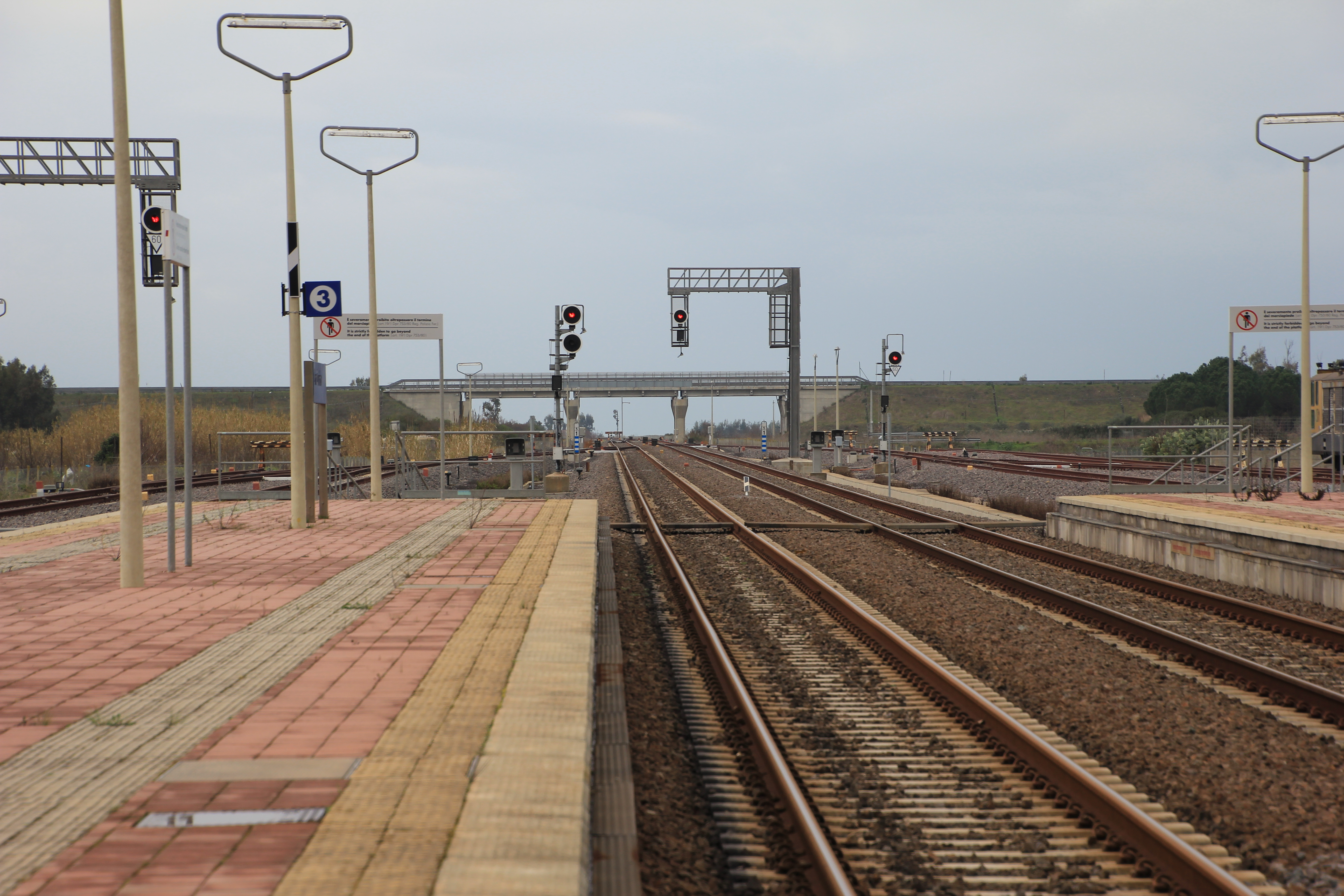 San Gavino Monreale - Stazione ferroviaria